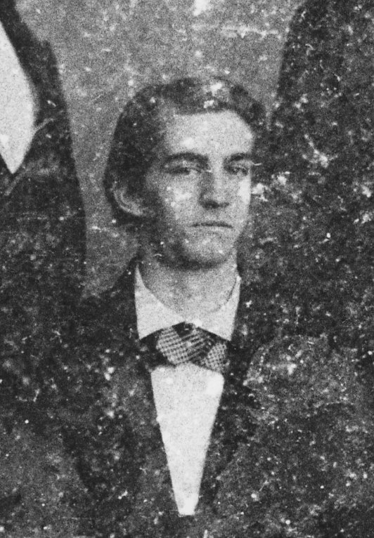 Julius Friedrich von Neumann (1835 - 1910), Prof. der Nationalökonomie in Basel, Freiburg und Tübingen. Hier: Student an der Königsberger Universität